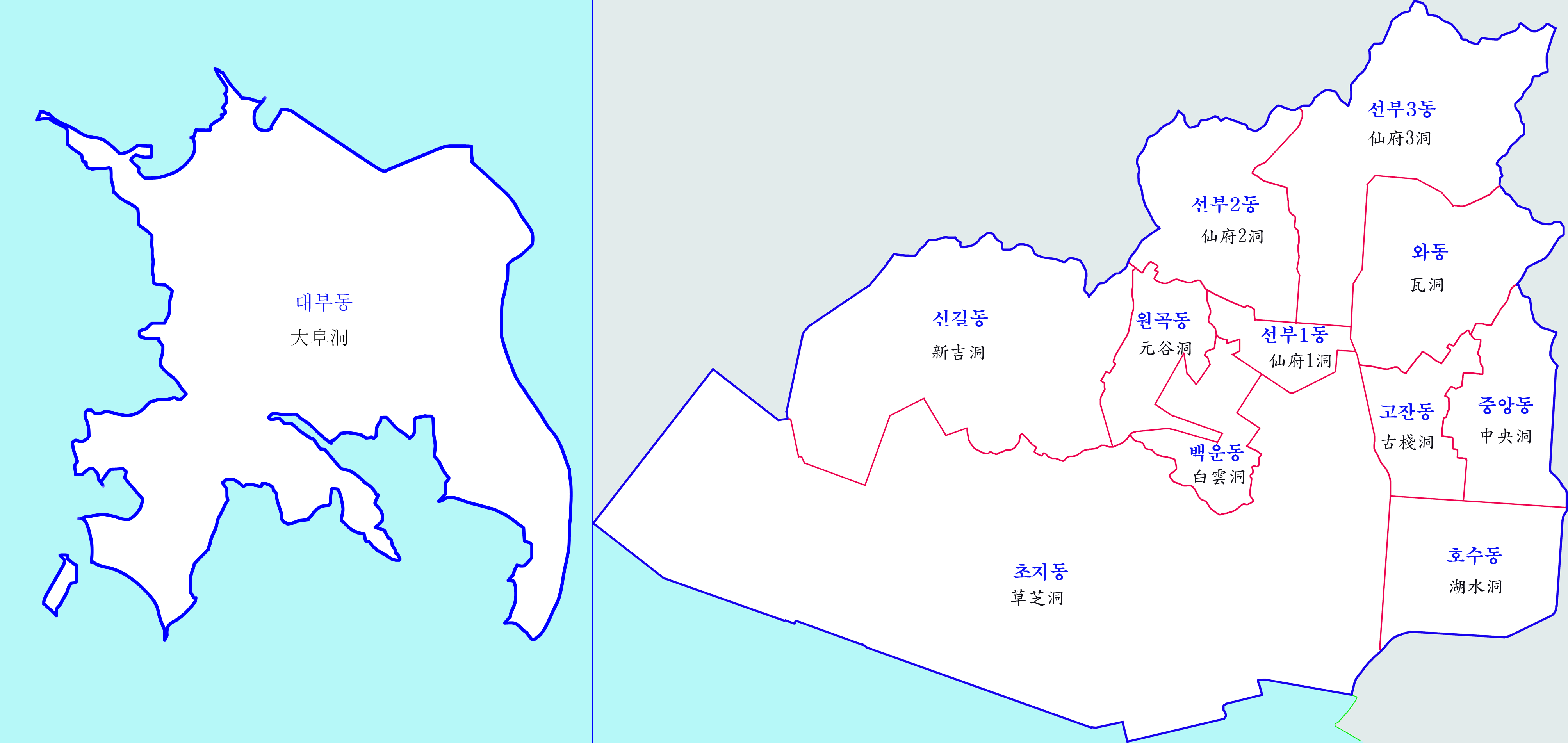 단원구의 본토와 섬